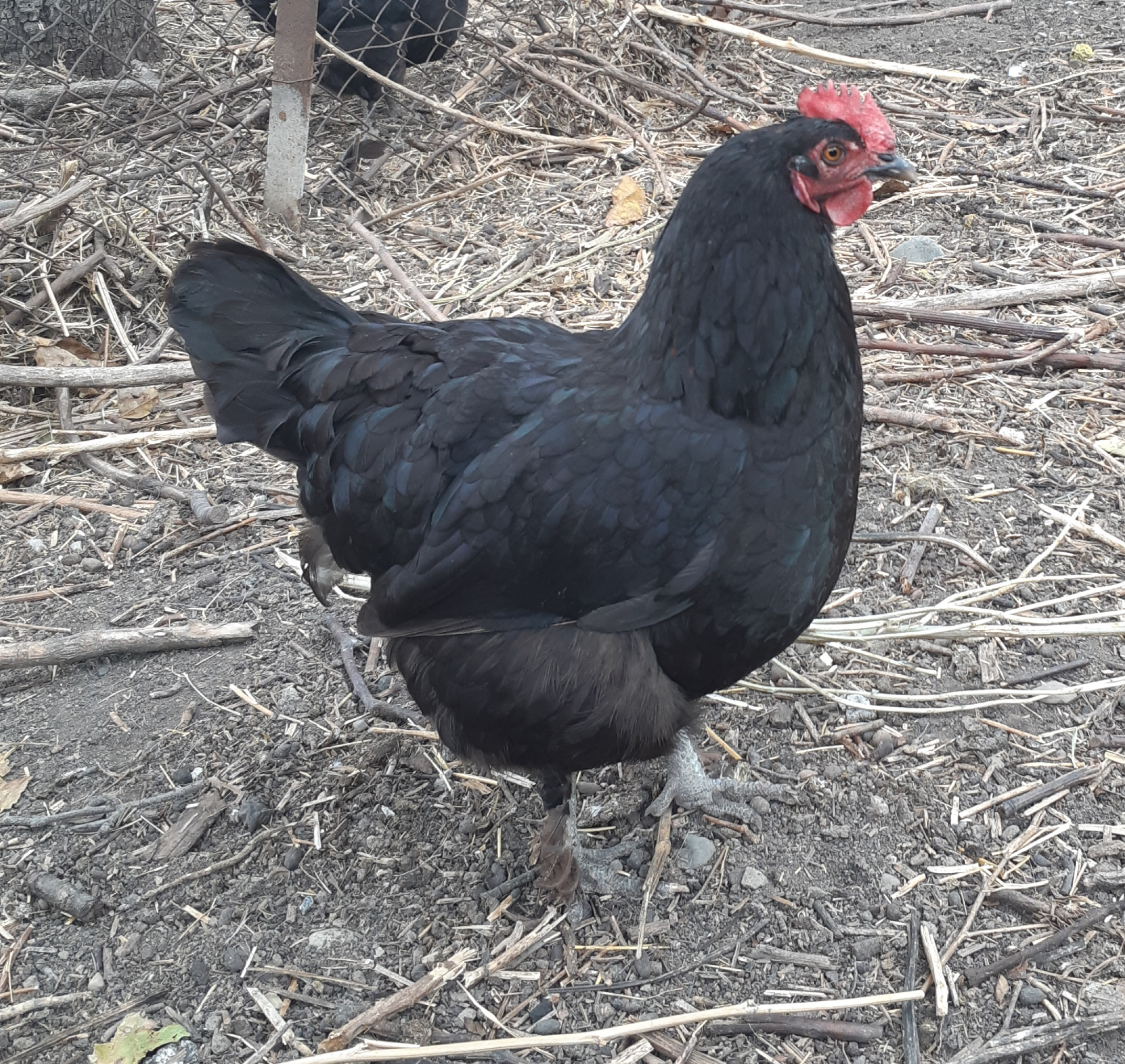 ქართული შავი ქათამი